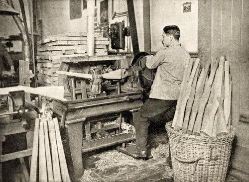 Zaandam, Nederland. De Rijks Artillerie-Inrichtingen (Staatsbedrijf der Artillerie-Inrichtingen) aan de Hembrug. In de geweermakerij: de bewerking van de geweerkolven (laden) . Achter de machine een stapel in ruwe geweervorm gezaagd hout: Machinaal worden de kolven glad gebeiteld. 1912